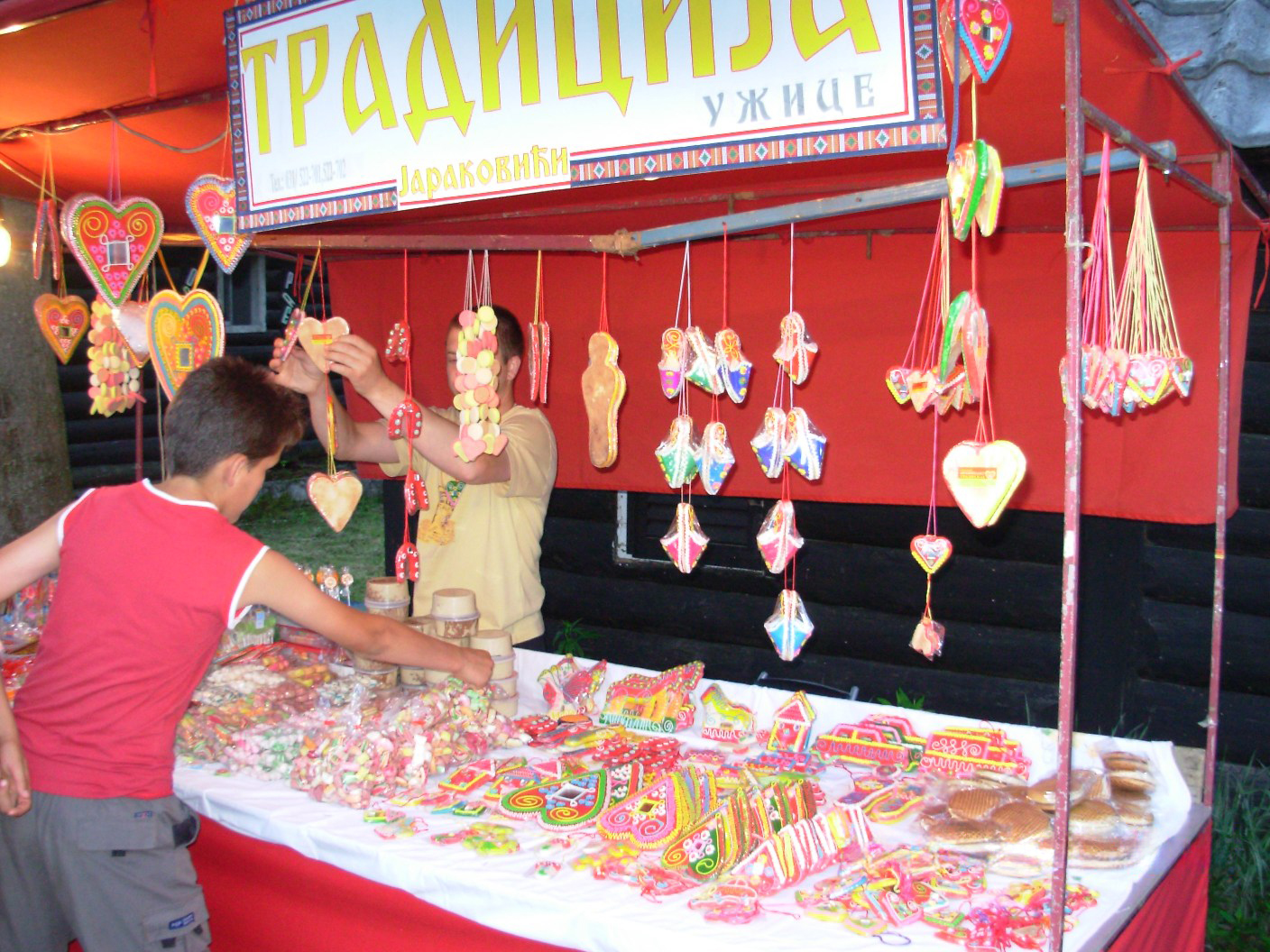 Голдфингер